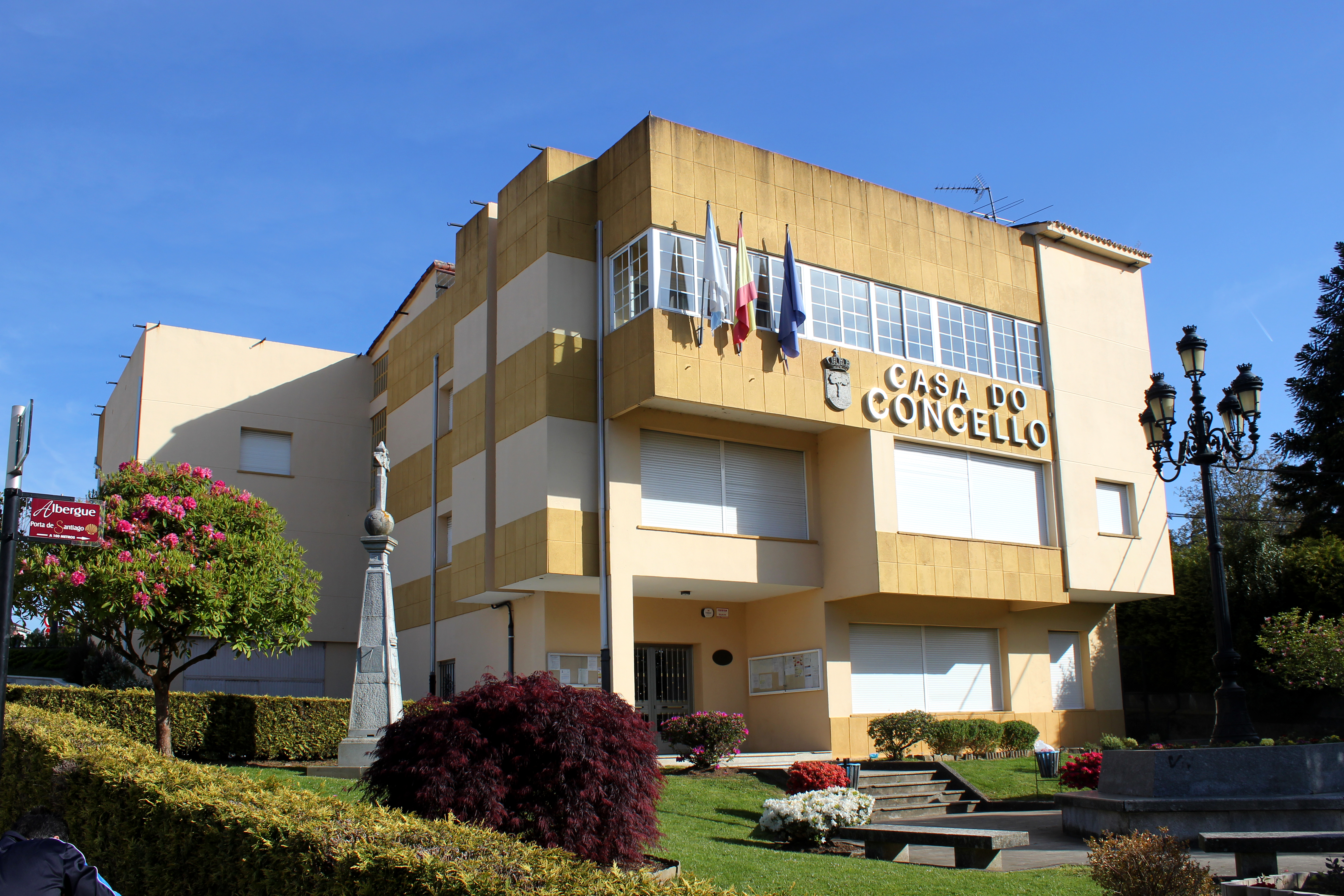 Casa do concello do Pino.